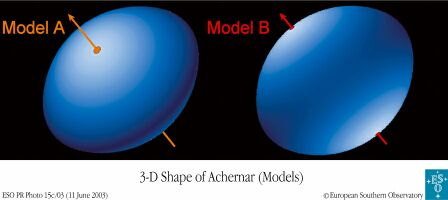 La forma del disco della stella Achernar. Paranal Observatory ESO